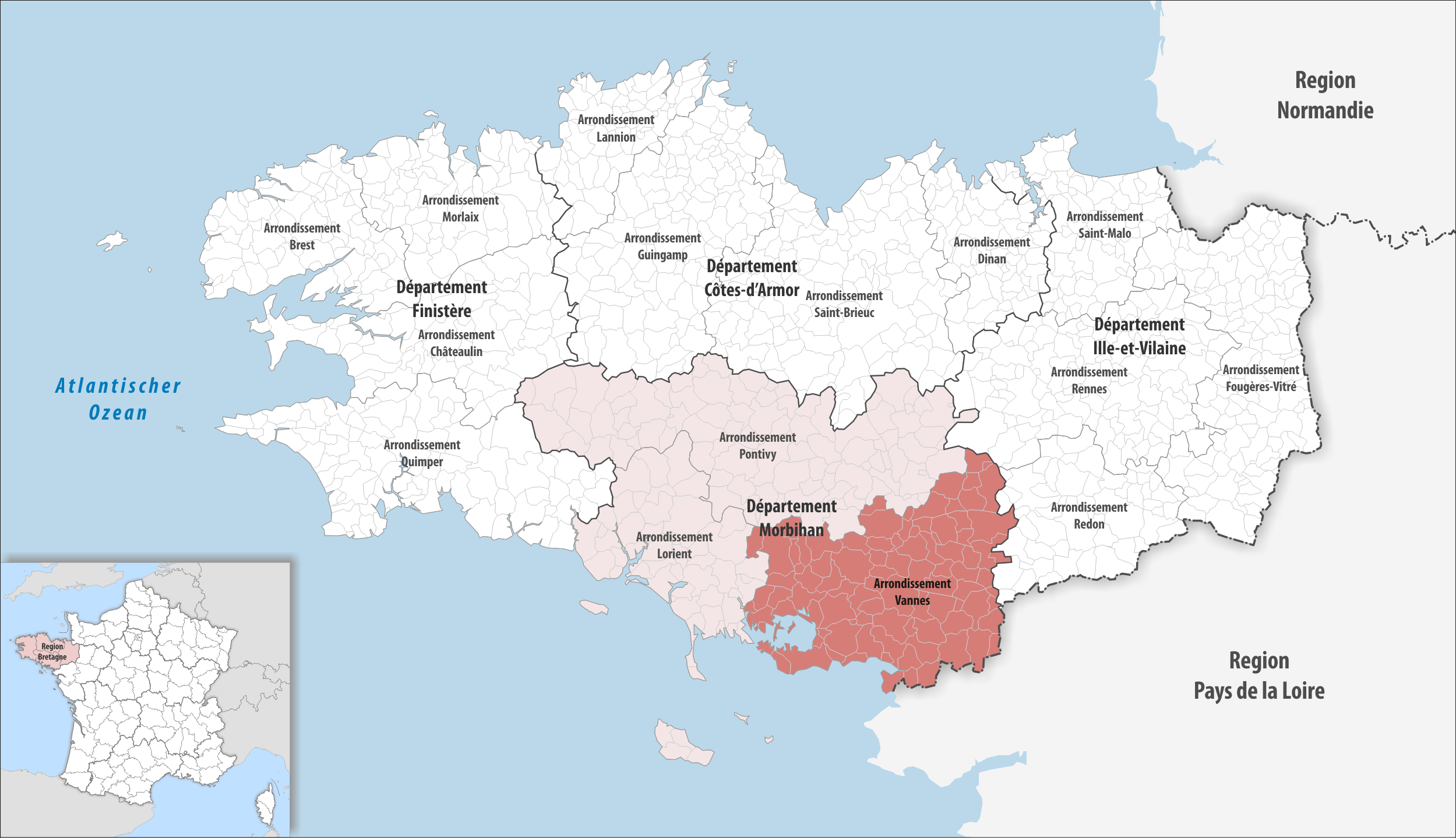 Lage des Arrondissements Vannes